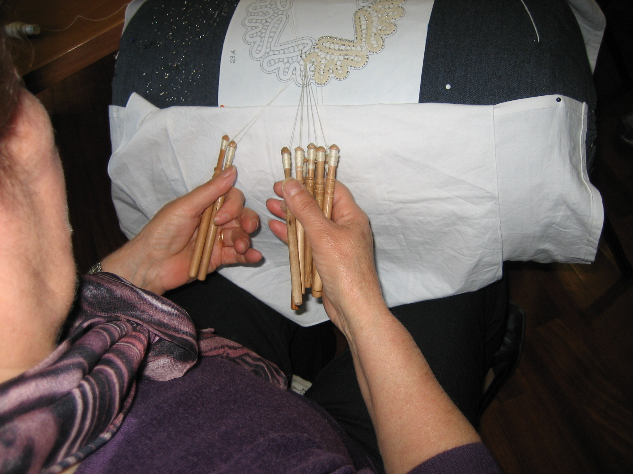 Donna di Pescocostanzo (Abruzzo) al lavoro al tombolo per la creazione di artistici merletti di cotone.